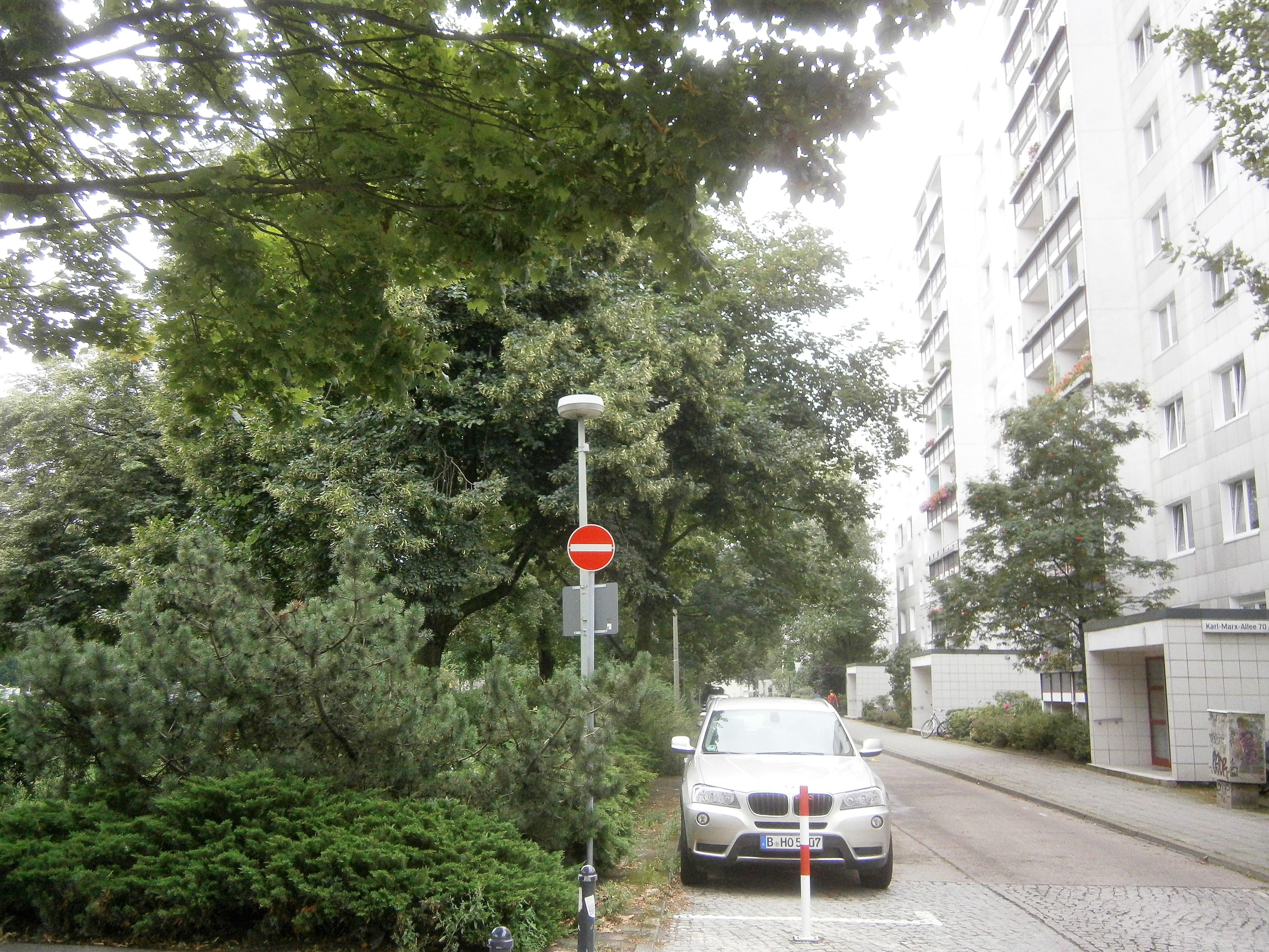 Die Andreasstraße ist eine Straße im Berliner Bezirk Friedrichshain-Kreuzberg, Ortsteil Friedrichshain. Angelegt wurde sie 1862 auf vorherigen Gartenland und 1863 benannt. Bis um 1900 waren die Grundstücke bebaut und bis 1930 wurde verdichtet. Bei Luftangriffen im Zweiten Weltkrieg wurde die Gebäude schwer getroffen. So ist die Straße seit den 1950er Jahren mit wiederhergestellten Altbauten, aber besondres durch Plattenbau-Wohnblöcke aber seit 1990 auch durch Hotel- und Bürobauten im Umfeld des Ostbahnhofs charakterieisiert. Das Bild zeigt: Wohnzeile Karl-Marx-Straße 70a—70i vom aufgegebenen Grundstück Andreasstraße 44* 45, bis zur Zerstörung bei Luftangriffen stand hier ein Eckwohnhaus, der verbliebene wiederaufbaufähige Altbau auf 44 wurde 1960 angerissen.